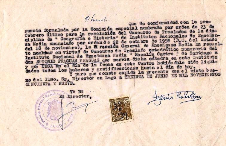 Traslado de Antón Fraguas de Lugo ao Instituto Rosalía de Castro de Santiago de Compostela